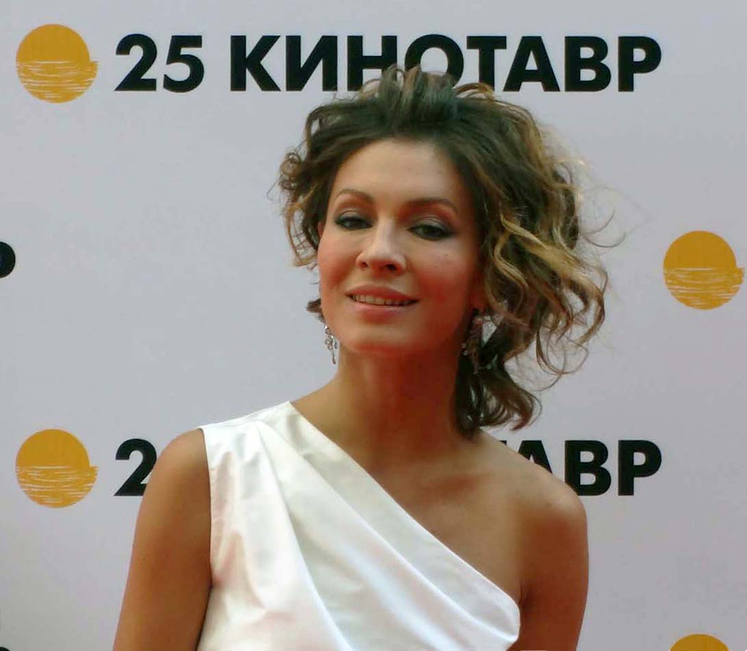 Церемония открытия фестиваля "Кинотавр -2014" в Сочи.